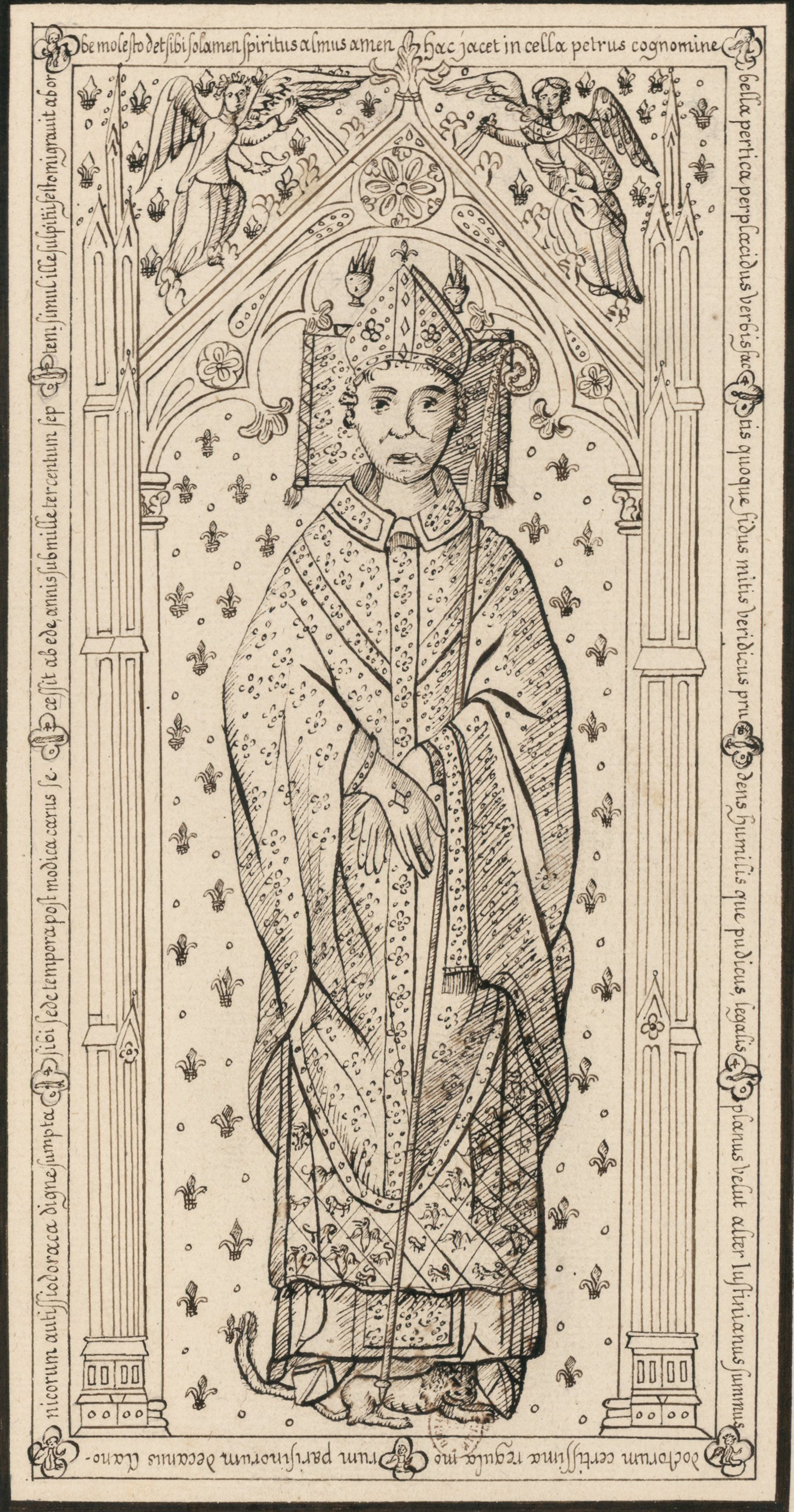 Pierre tombale sur laquelle est gravée l'effigie d'un prélat dans une bordure gothique